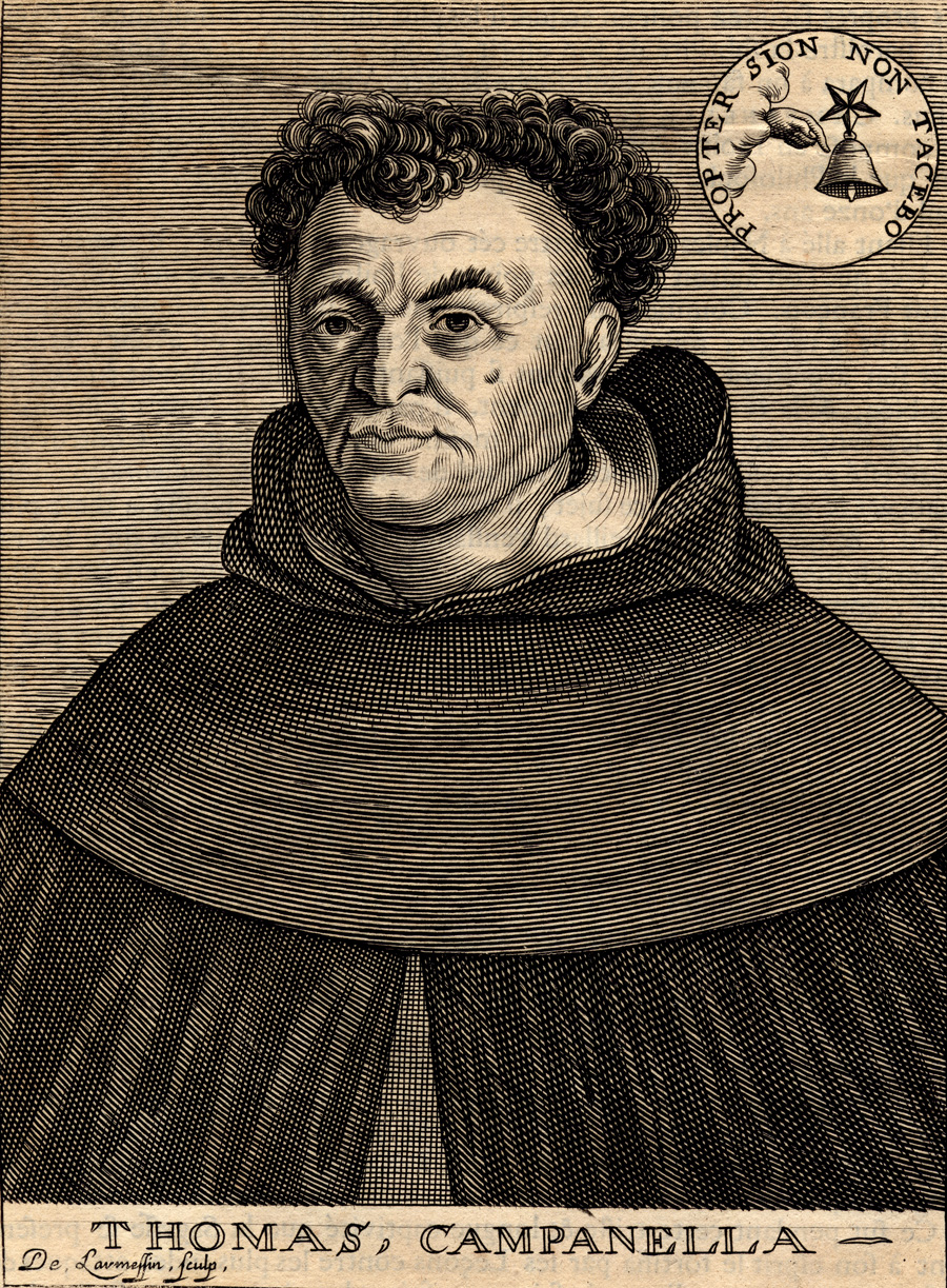 Tommaso Campanella, incisione in rame, 28 x 20 cm, in Isaac Bullart, «Académie des Sciences et des Arts», livre II, 1682